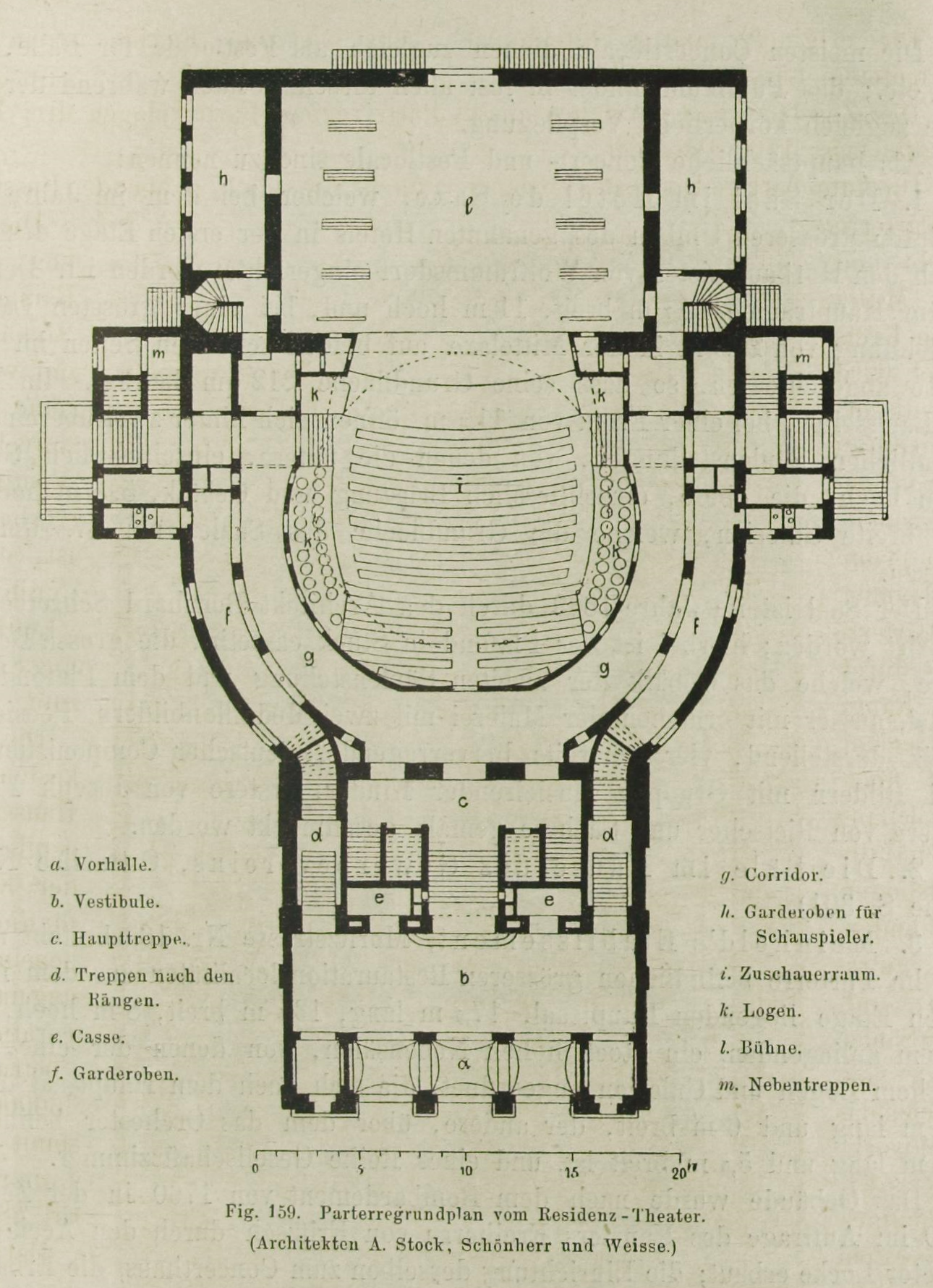 Grundriss Residenz-Theater Dresden aus: Die Bauten, technischen und industriellen Anlagen von Dresden. Herausgegeben vom Sächs. Ingenieur- und Architekten-Verein und vom Dresdener Architekten-Verein. Meinhold, Dresden 1878